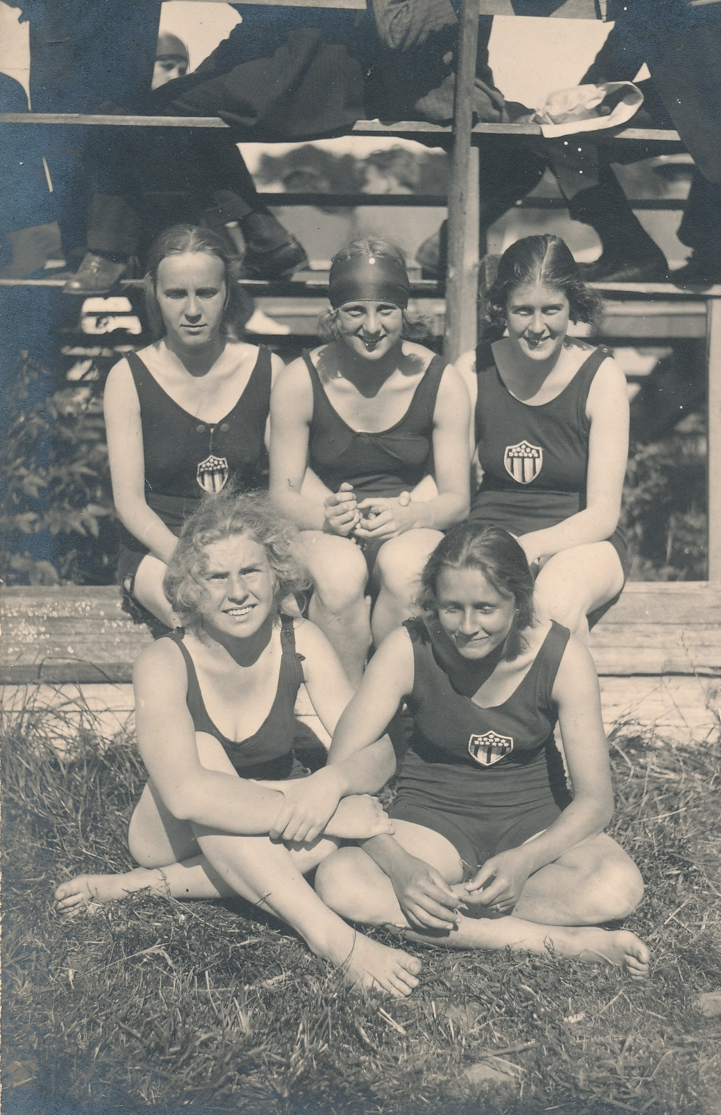 Harjumaa esivõistlused ujumises, ESM F 363:46/A 6010, Eesti Spordi- ja Olümpiamuuseum SA. Grupp Kalevi naisujujaid. Ees vasakult: Irene Allas ja Alla Tõrvand. Taga vasakult: T. Tellmann, Emma Rosnberg (Redlich), Cita Tellmann.